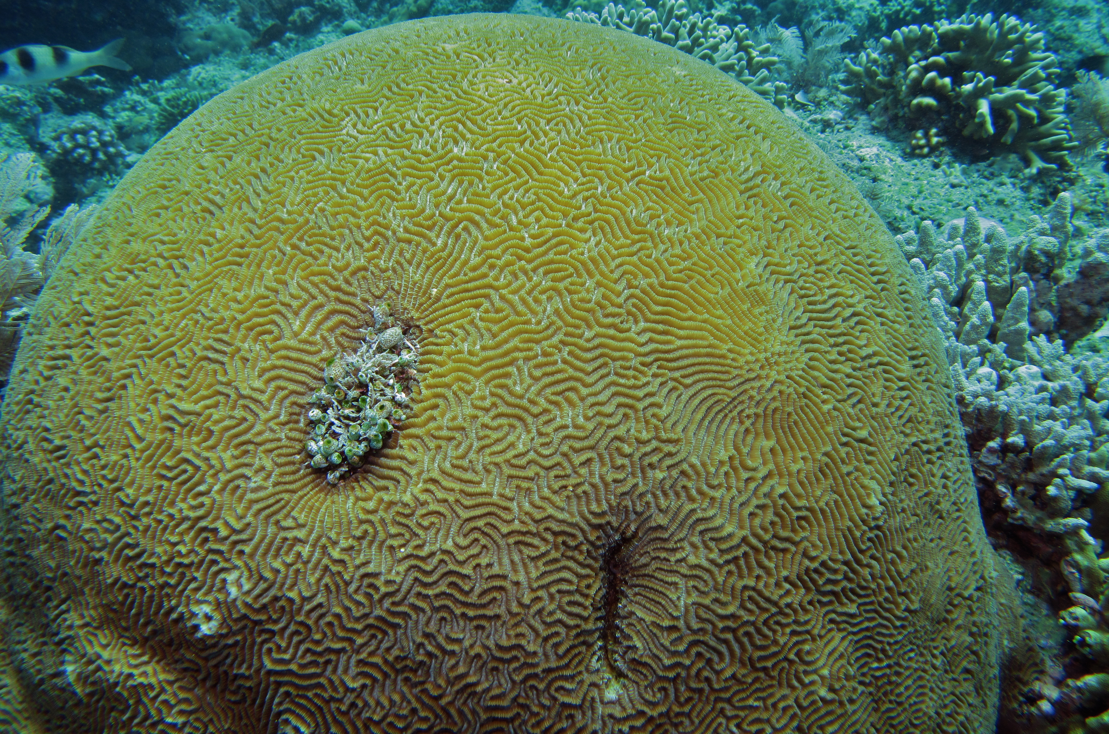 Sachiko, Bunaken Island, Sulawesi, INDONESIA